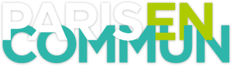 Logo de Paris en Commun utilisé par Anne Hidalgo lors des élections municipales de 2020 à Paris.